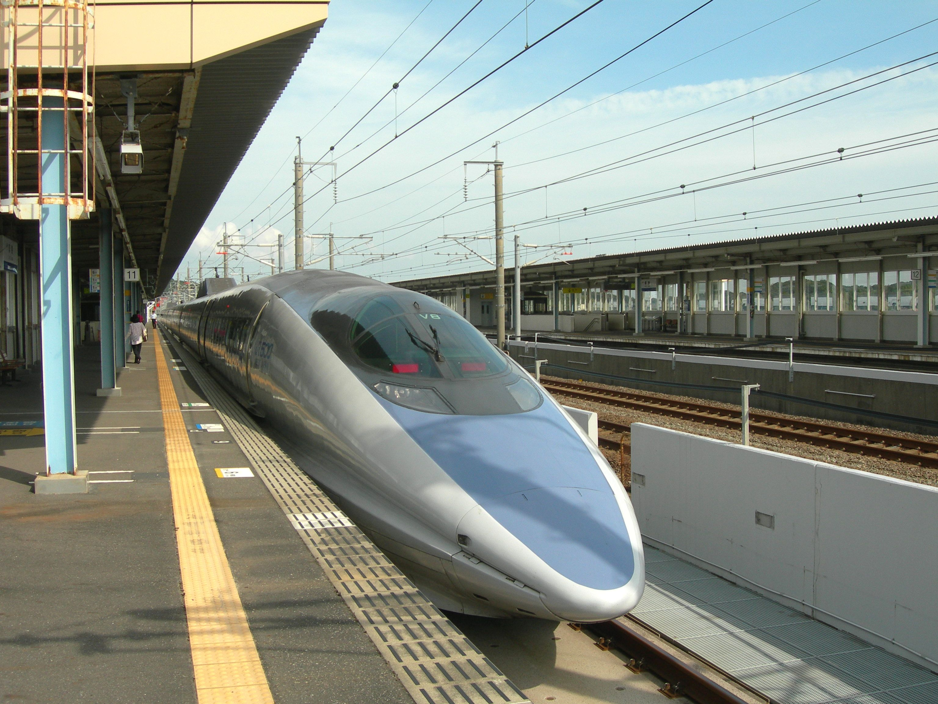 厚狭駅新幹線ホーム